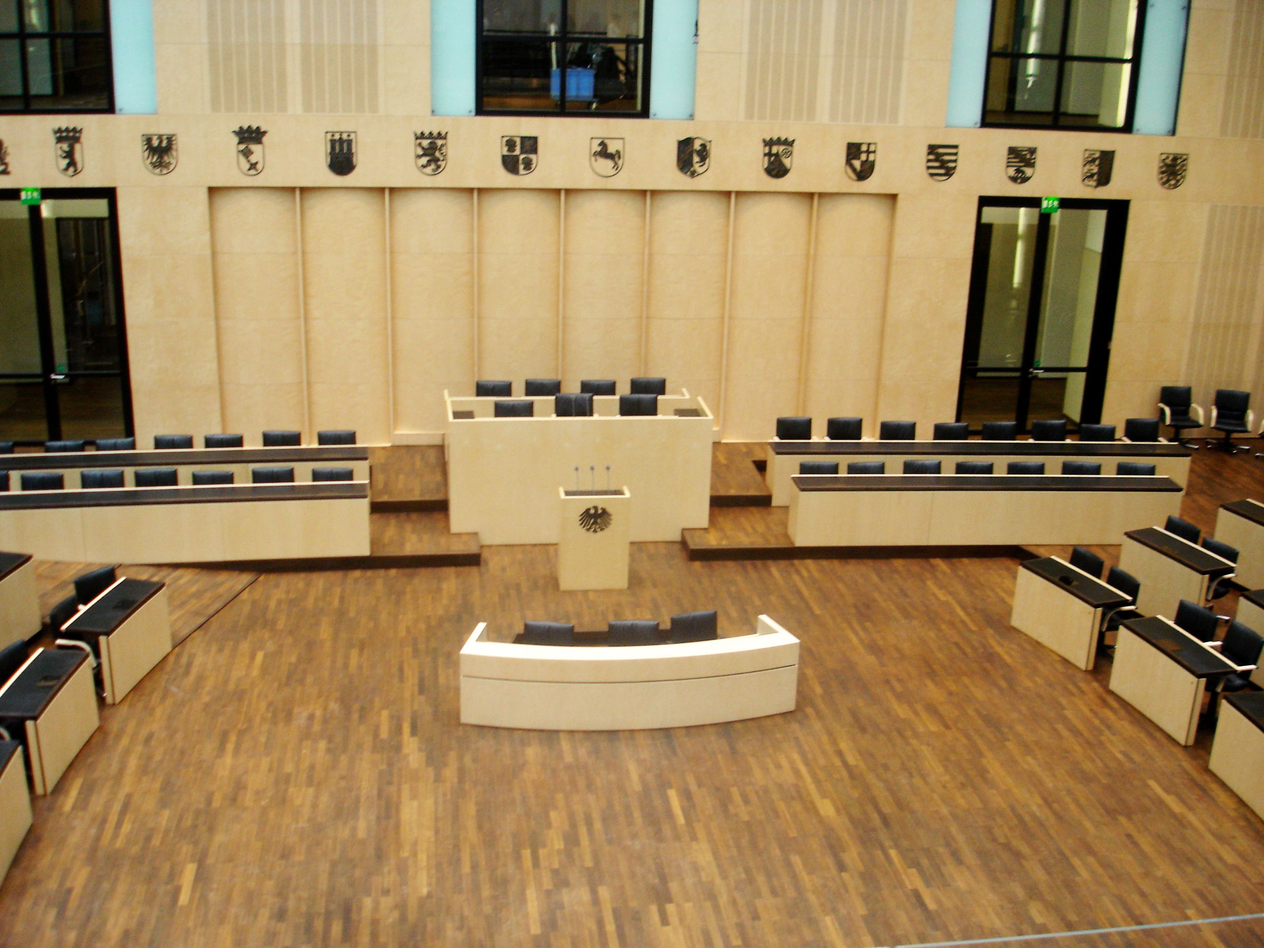 Plenarsaal des deutschen Bundesrats Hornjoserbsce: Plenarna žurla němskeje Zwjazkoweje rady